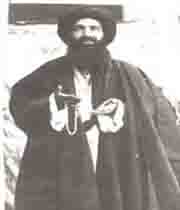 آیت الله سیدابوالقاسم نجفی دهکردی (اصفهانی)